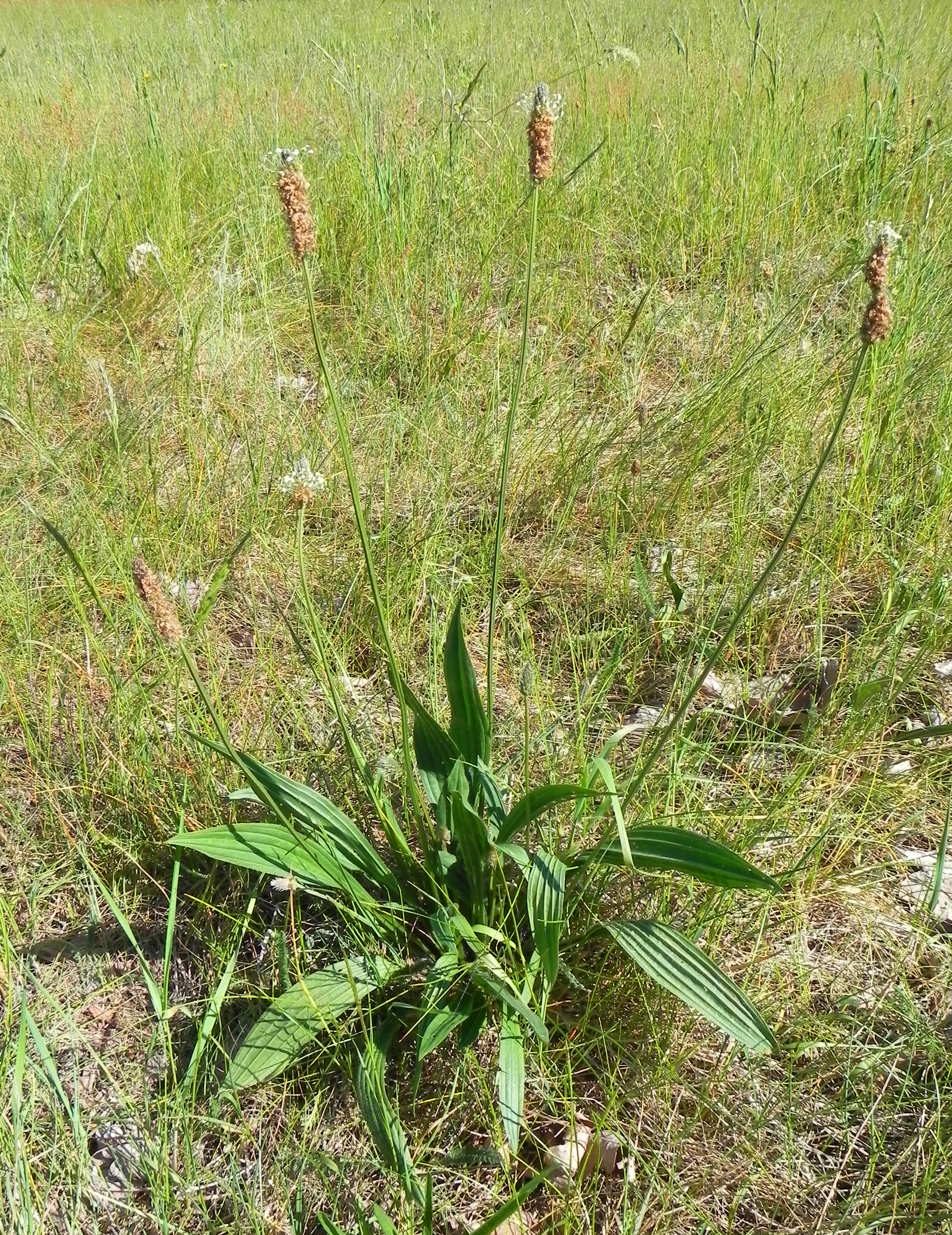 Spitzwegerich (Plantago lanceolata), Standort Naturpark Südheide, Niedersachsen, Germany